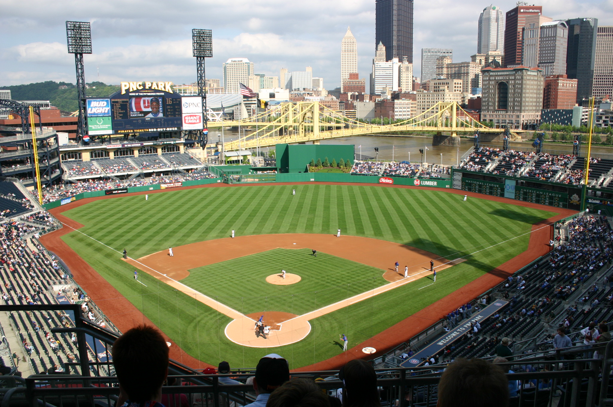 PNC-Park